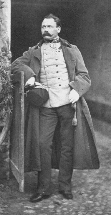 Franz von John (* 20. November 1815; † 25. Mai 1876), österreichischer General